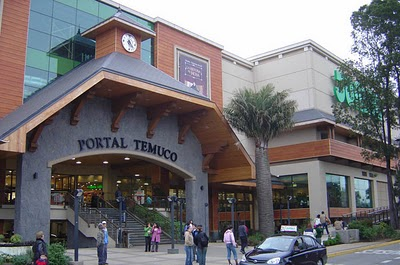 Centro comercial Portal Temuco, de la ciudad de Temuco, Chile.